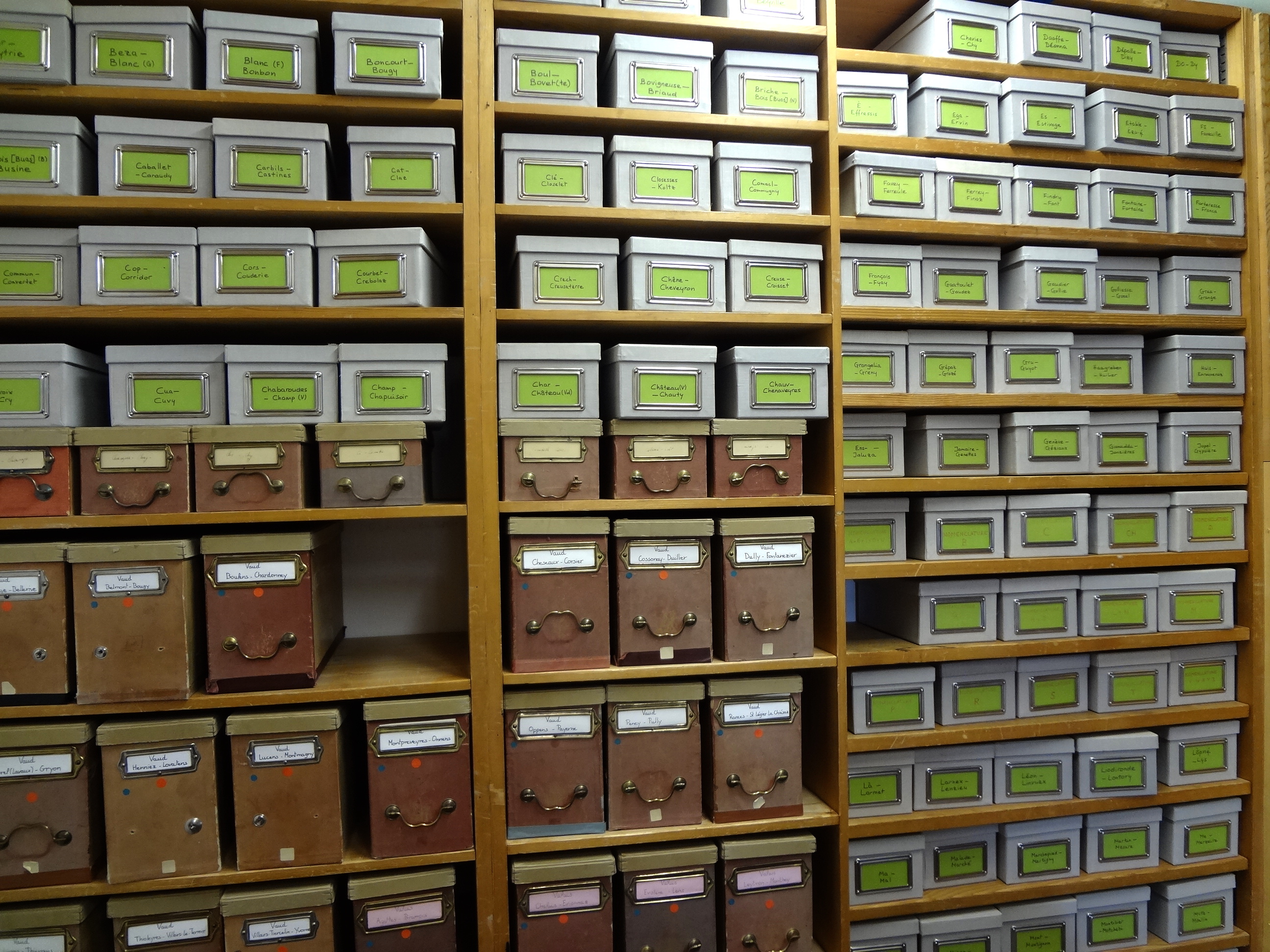 Boîtes du fichier toponymique « Muret » au Glossaire des patois de la Suisse romande.